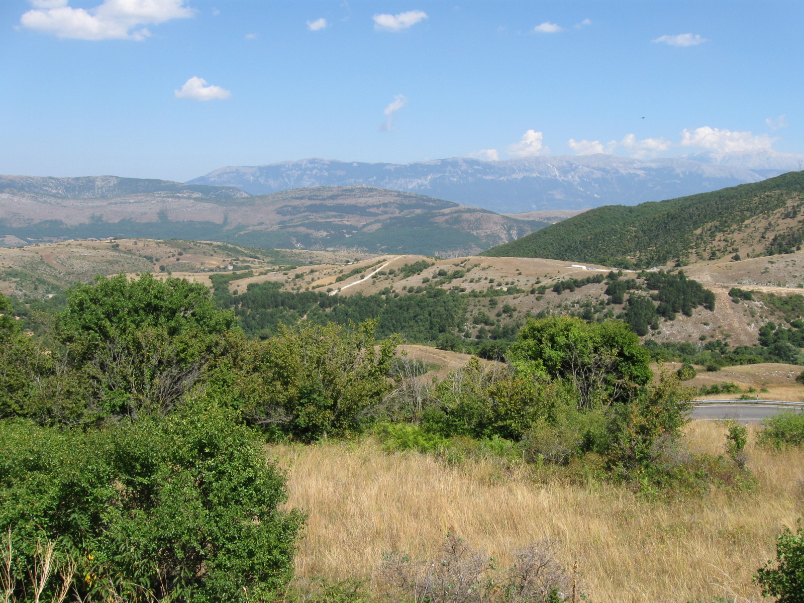 Forca Caruso, Abruzzo